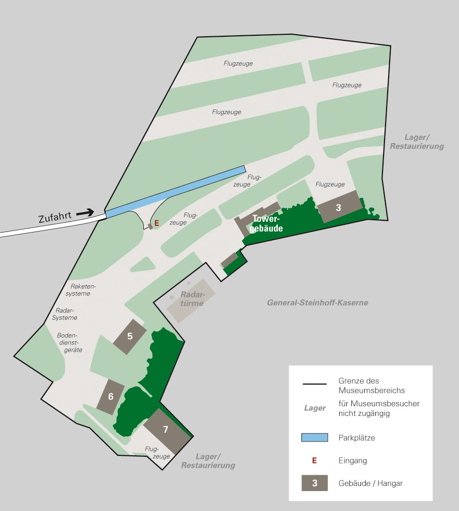 Plan des Luftwaffenmuseums in Berlin-Gatow